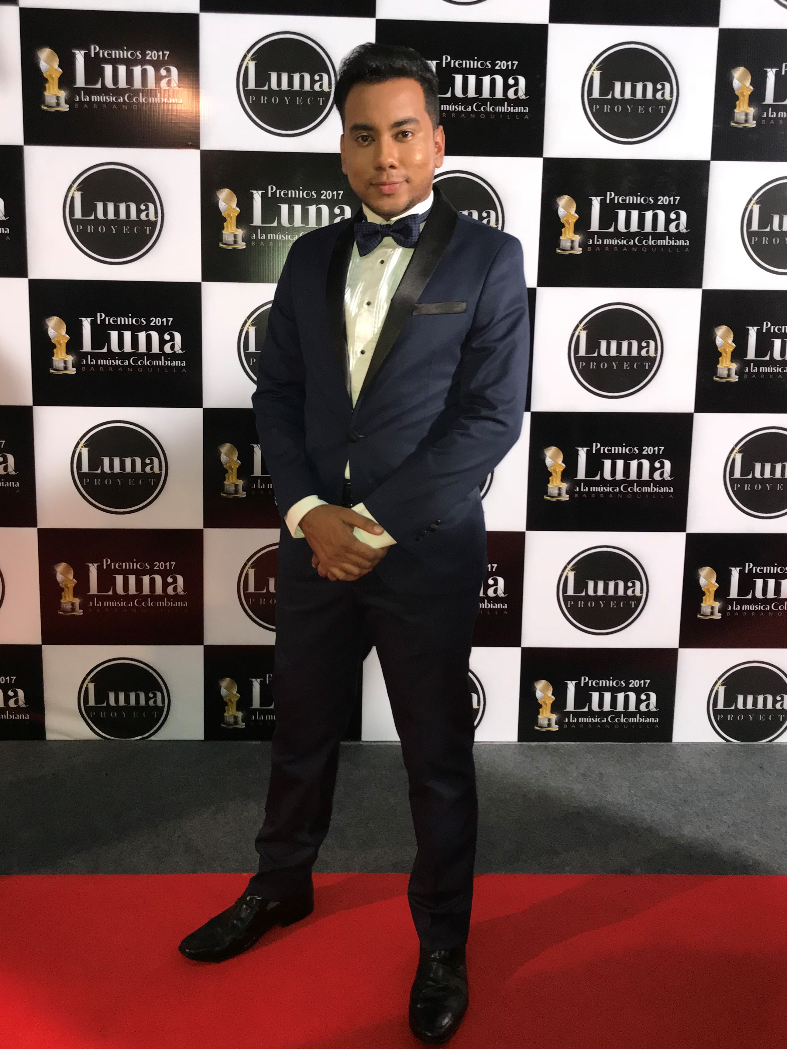 Sergio Borrero en la Alfombra Roja de los Premios Luna 2017